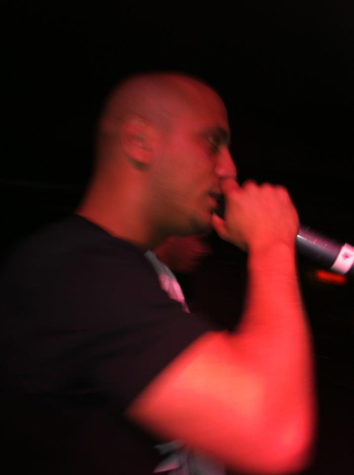 Alpa Gun auf seiner Ehrensache-Tour 2012